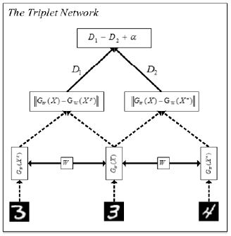 نمایی از کار شبکه تریپلت